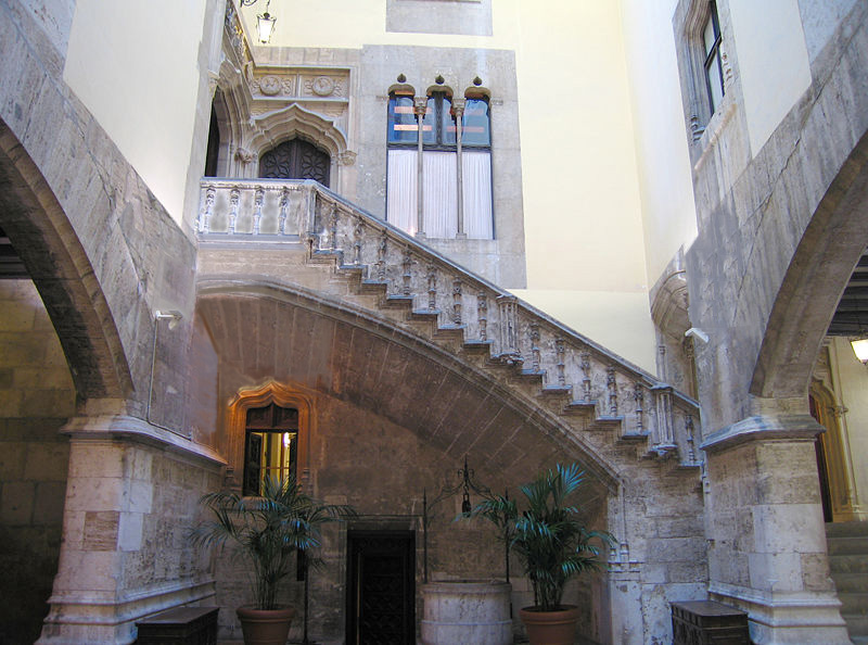 Pati de la Generalitat Valenciana